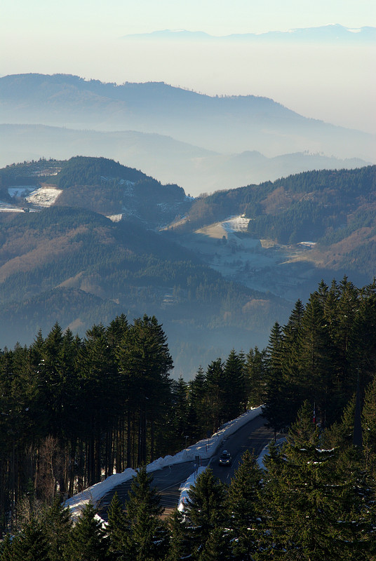 Die Schwarzwaldhochstraße am Mummelsee. Blick über das Rheintal.